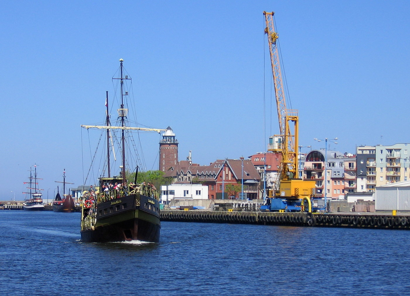 Port Kołobrzeg z nadpływającym statkiem Santa Maria IMO number: 7315466 Call Sign: SQPJ